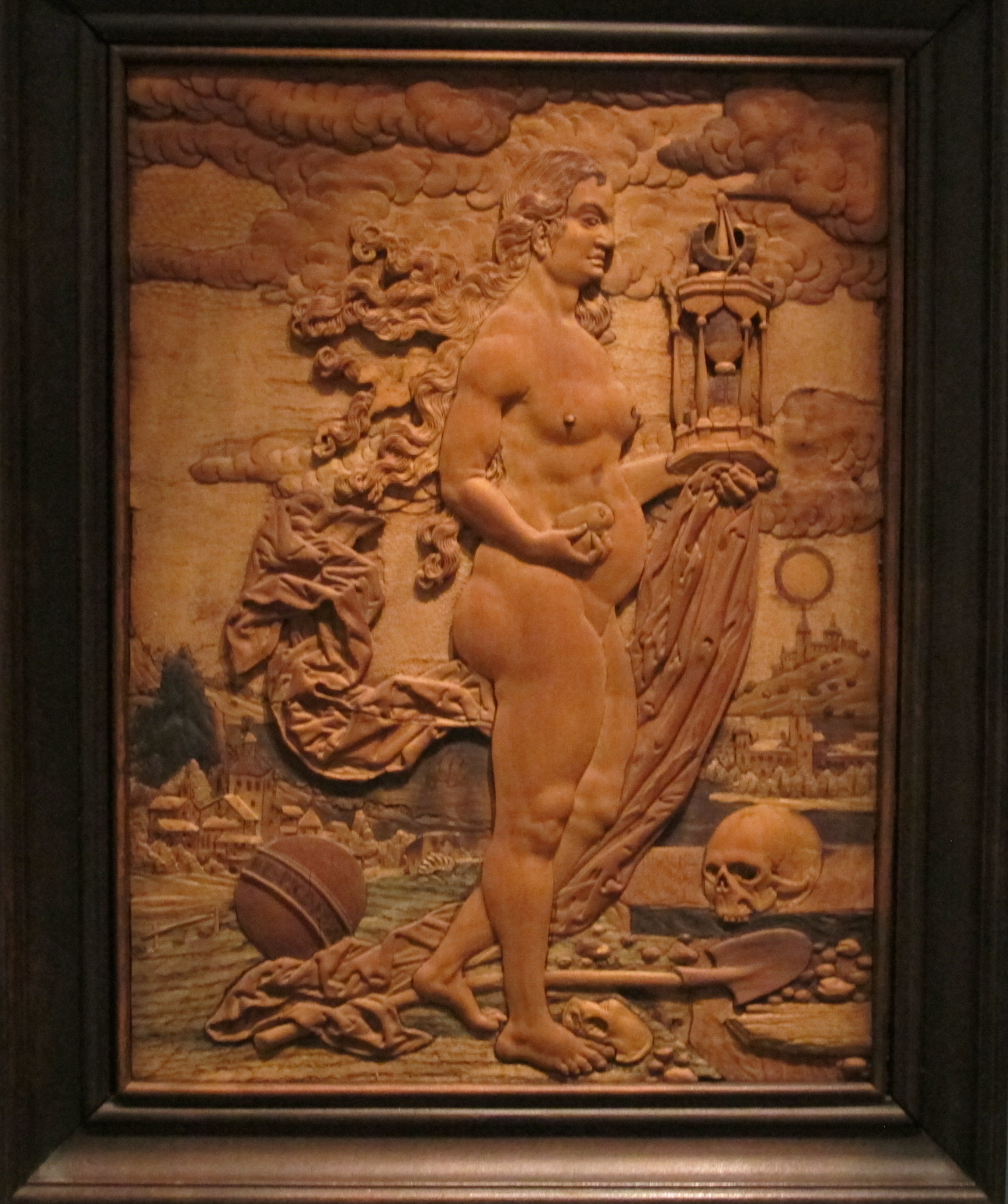 Allegoria della transitorietà, eger, 1650 ca